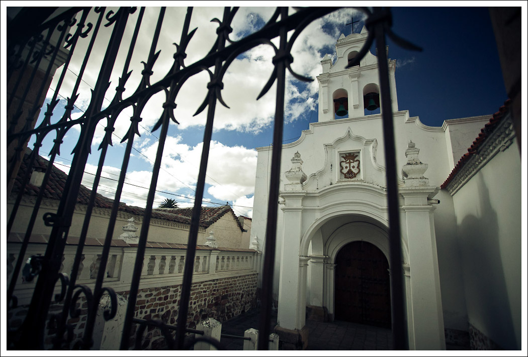 Convento de Santa Teresa y su callejón This medium shows the protected monument with the number H/00-023 in Bolivia.